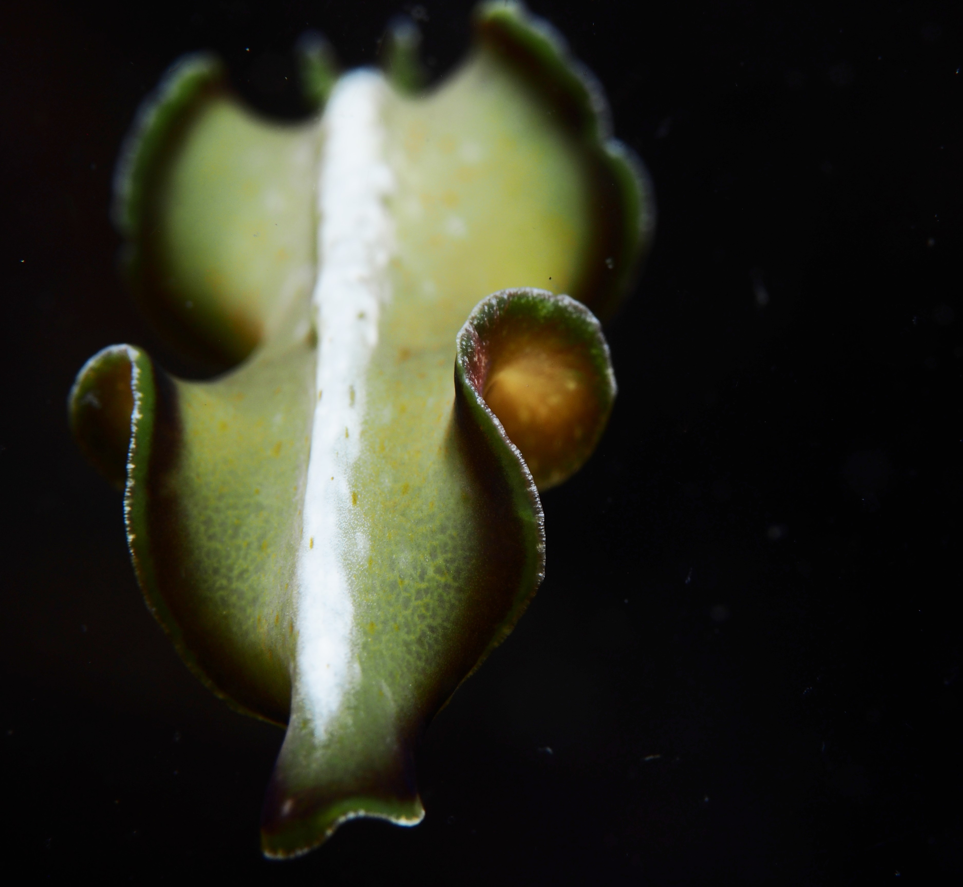 Diving Lembeh with Divers Lodge Lembeh over new years 2015/2016 / Indonesia - Pseudobiceros flowersi